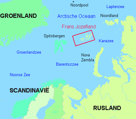 Ligging van Frans Jozefland.